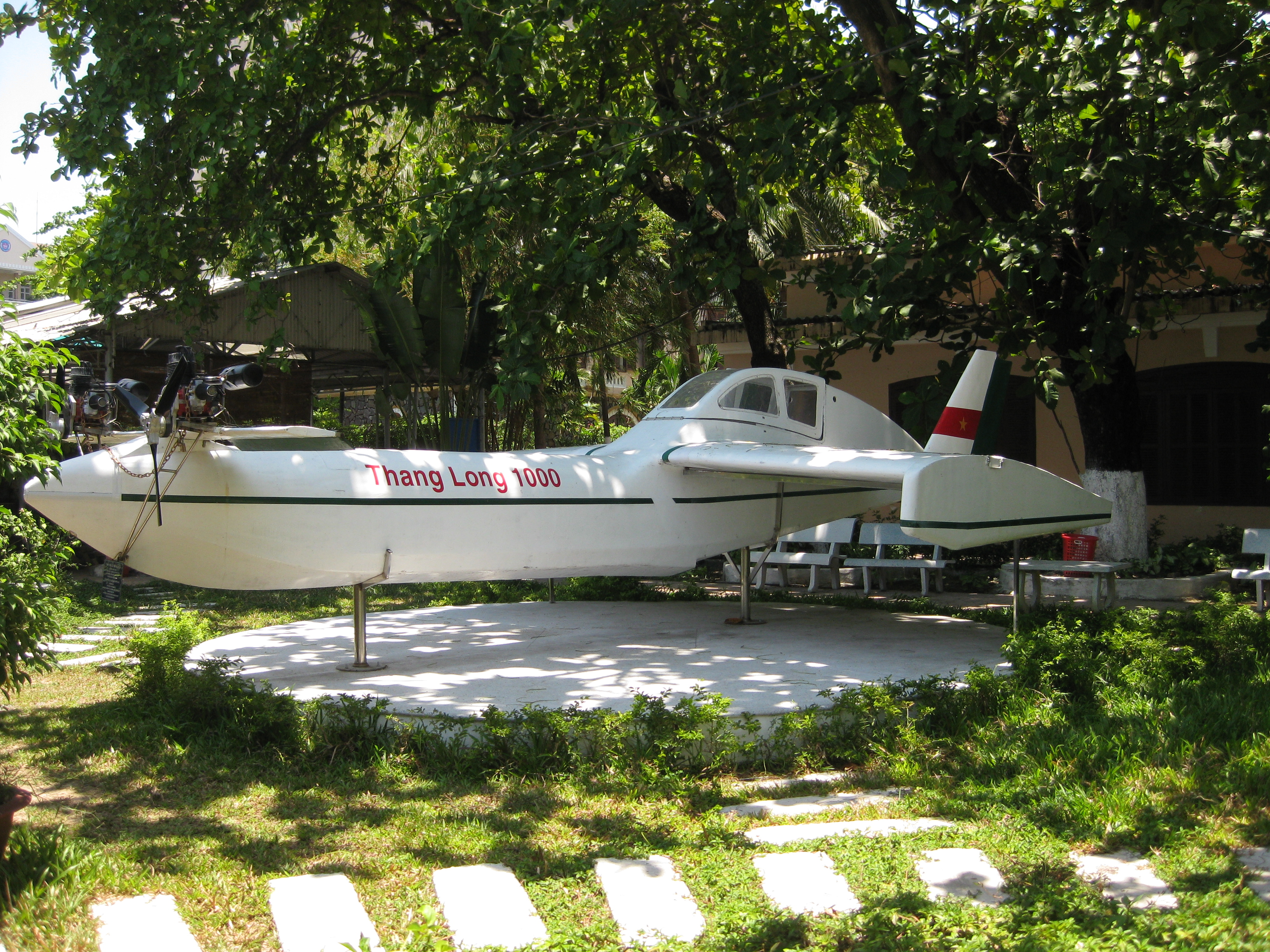 Mô hình ekranoplan 2 chỗ ngồi bằng vật liệu composite dài 8m, rộng sải cánh 5,2m, năng 400kg, 2 động cơ 27 mã lực đã được thử nghiệm. Hiện đang lưu giữ tại Viện Hải dương học, Nha Trang.